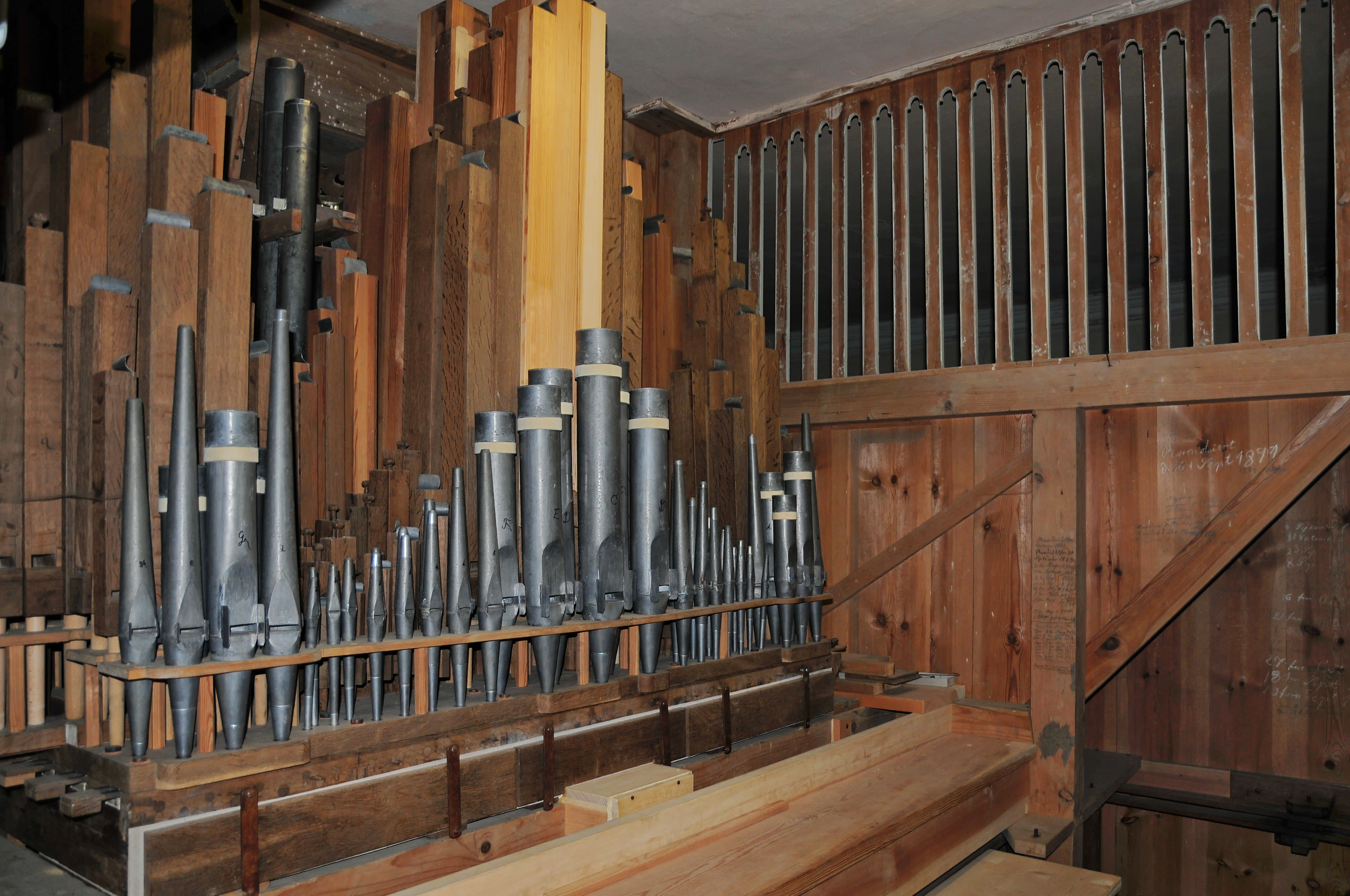 Blick in den Innenraum der Orgel der Dorfkirche Blankenhagen.